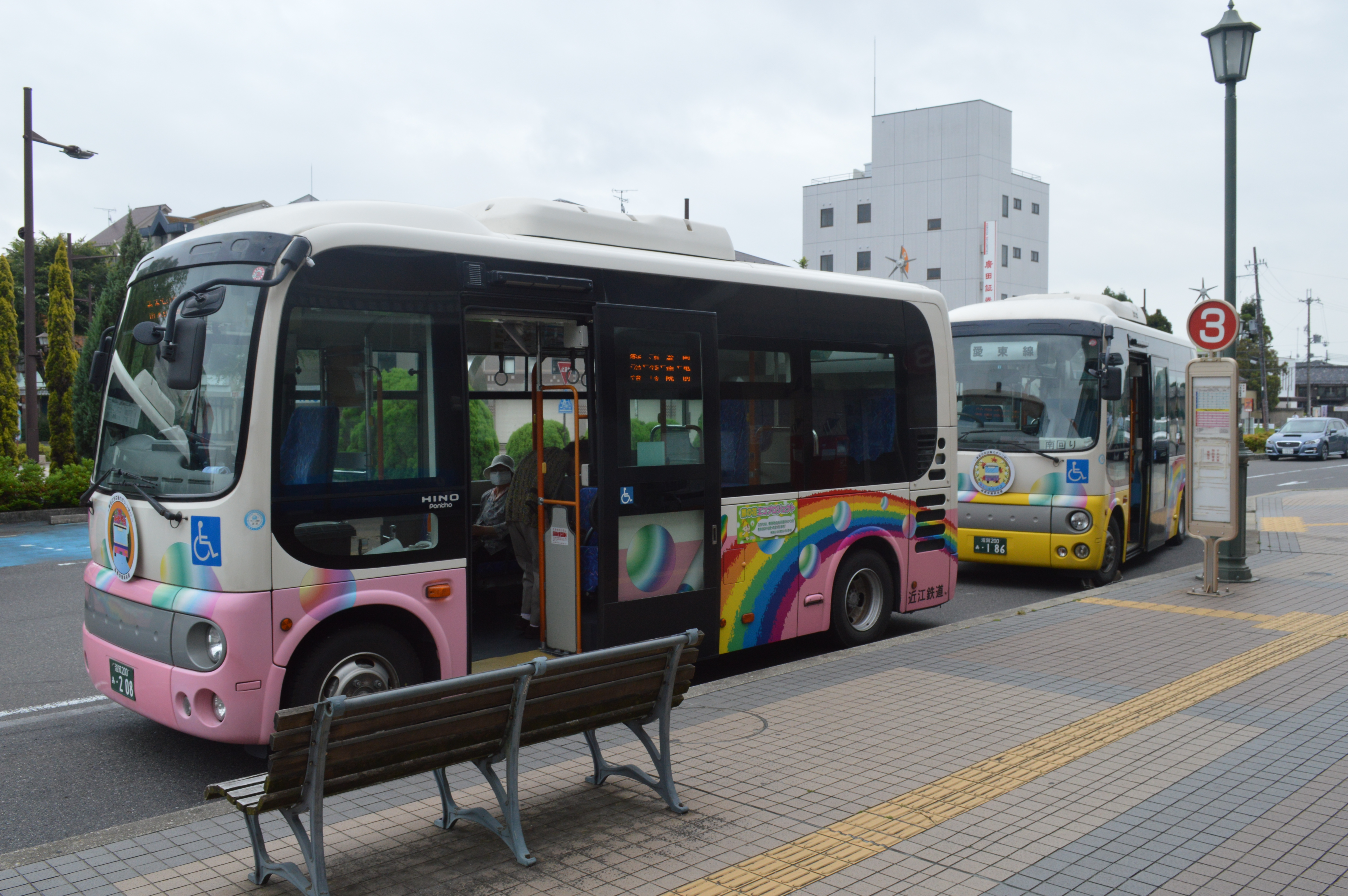 滋賀県東近江市で運行されているコミュニティバス「ちょこっとバス」。近江鉄道八日市駅前で撮影。